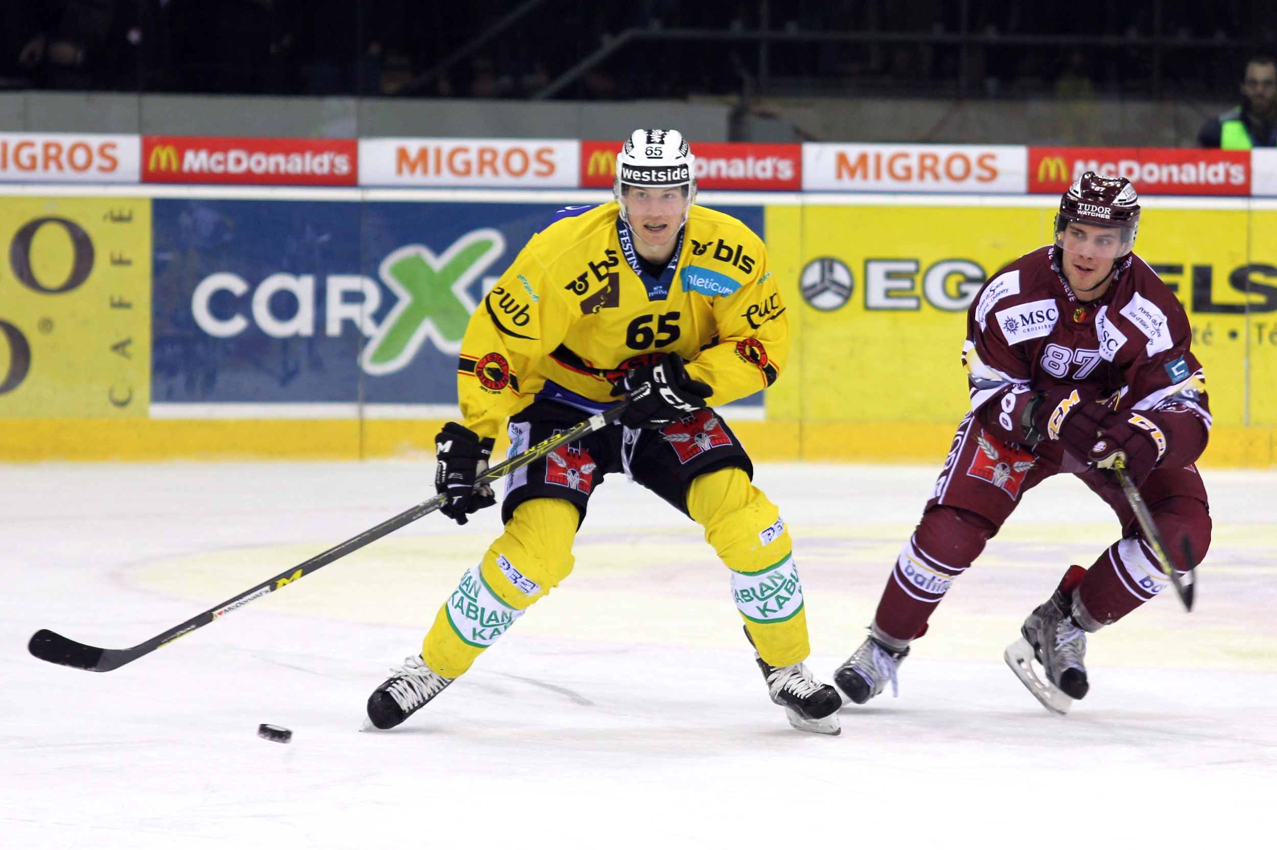 Ramon Untersander (B 65), Marco Pedretti (G 87).